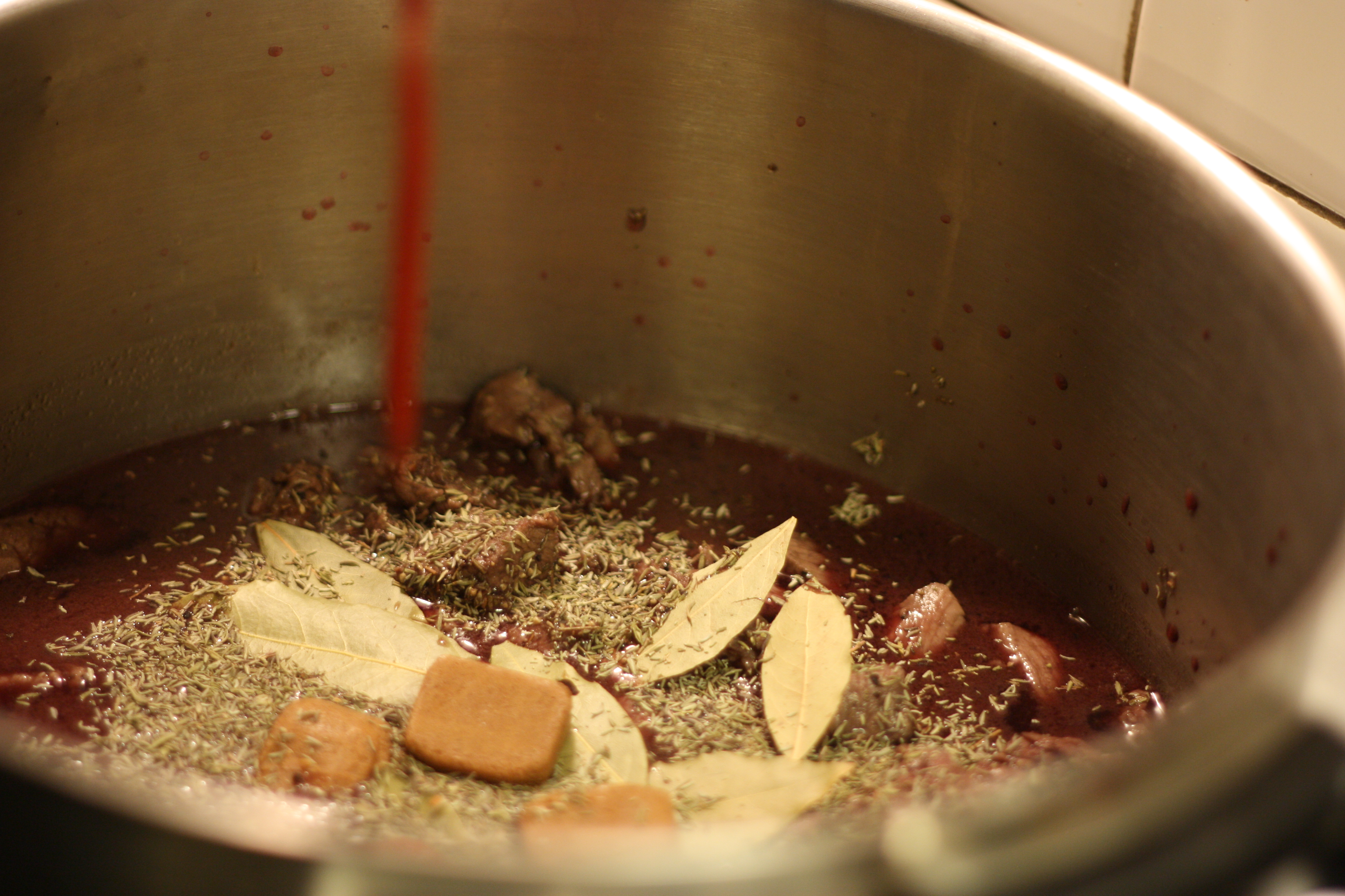 En rödvinsgryta tillagas.